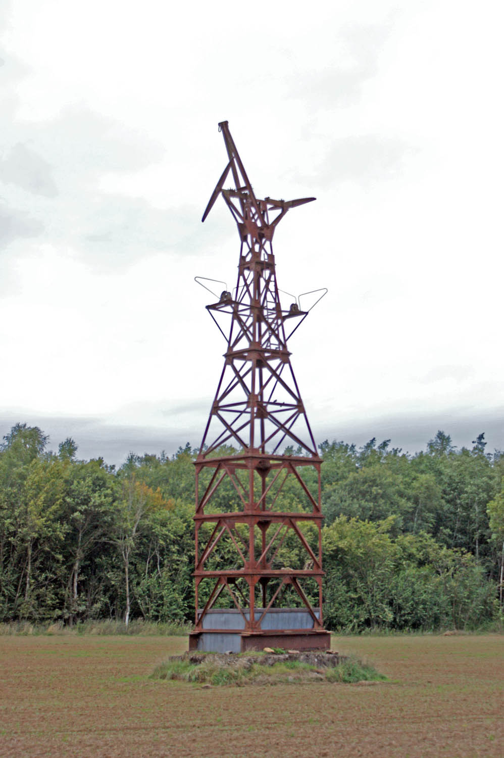 Potto vun der Seelbunn Ëtteng-Déifferdenger Schmelz, tëscht Dell, Häd an hënneschter Häd (Rëmeleng). September 2010